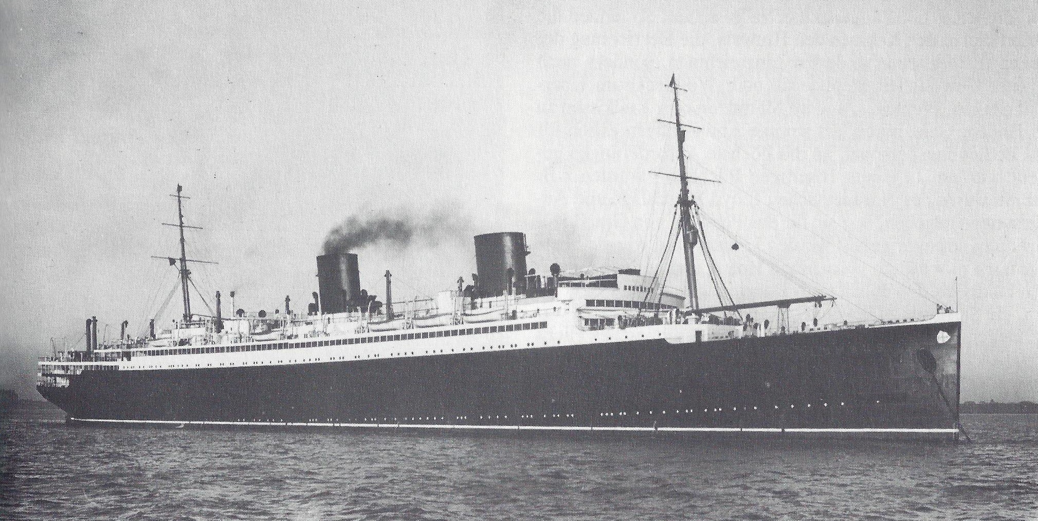 Columbus (Schiff, 1924).